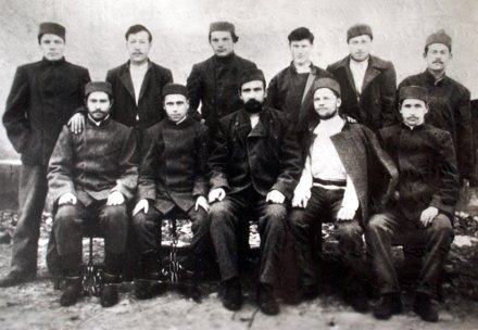 Гришине учасники Російської революції 1905-1907